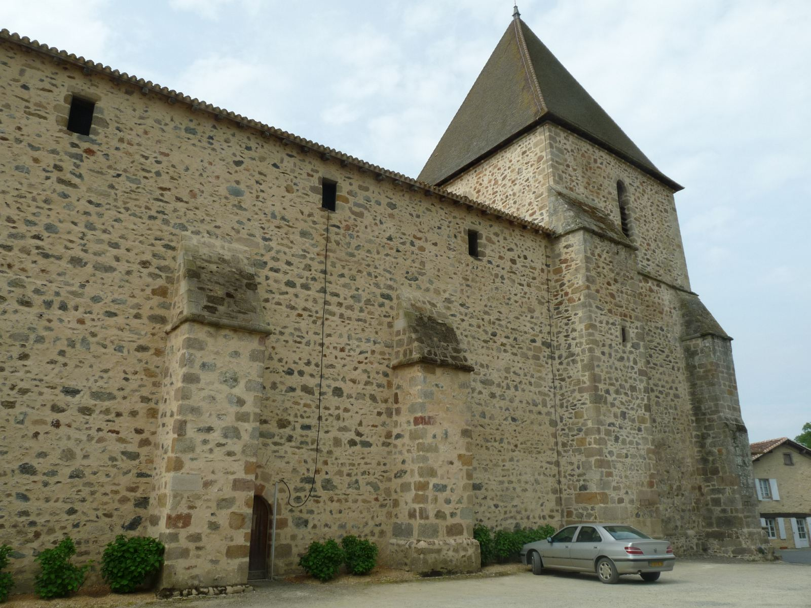 église de Saulgond, Charente, France